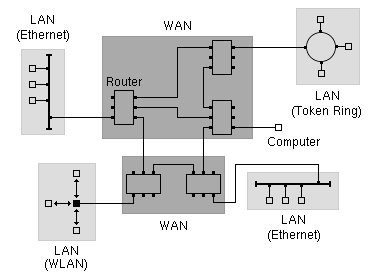 Schemateschen Opbau vum Internet (August 2005).